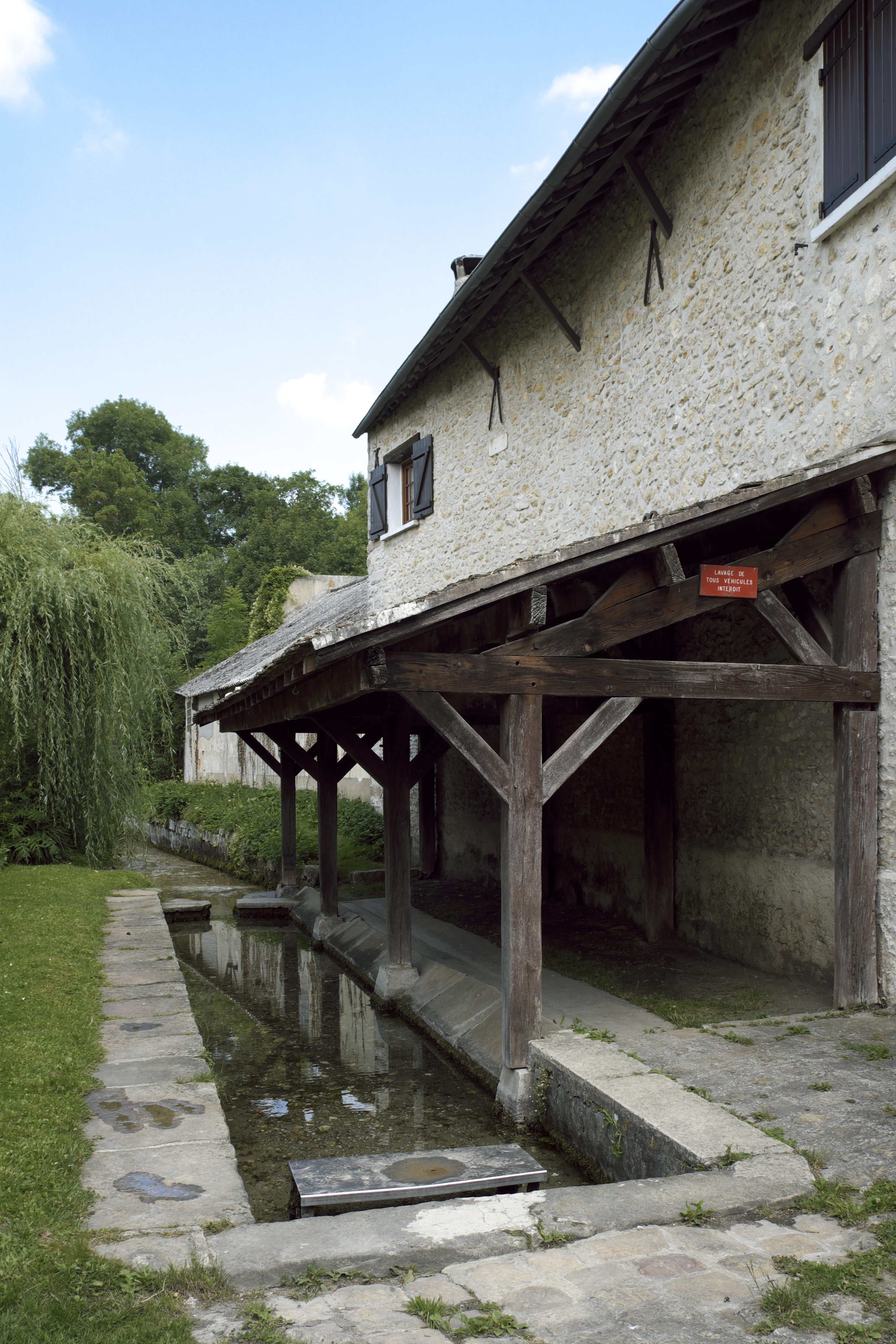 Waschhaus in Vayres-sur-Essonne im Département Essonne (Île-de-France/Frankreich)